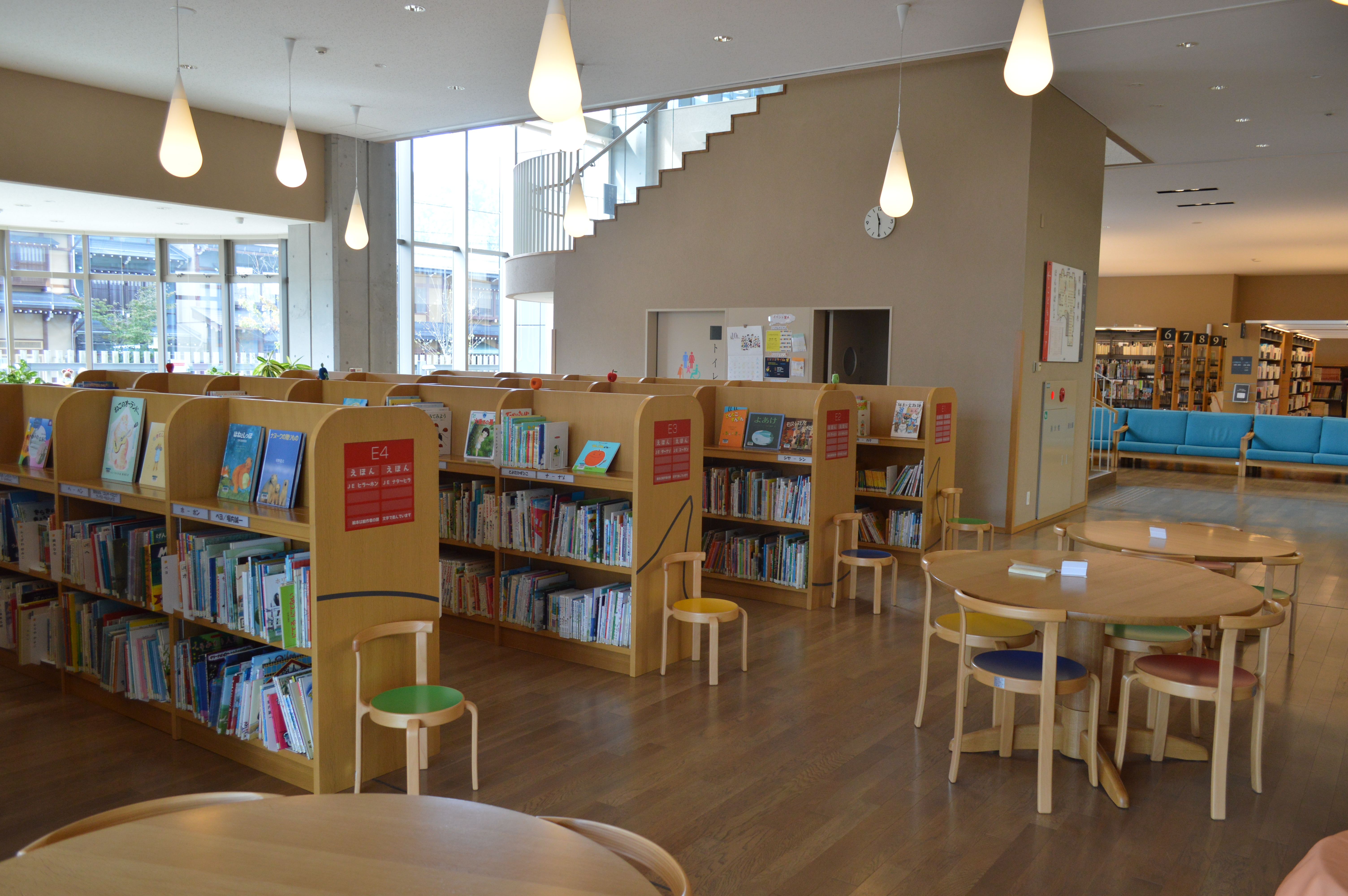 飛騨市図書館。